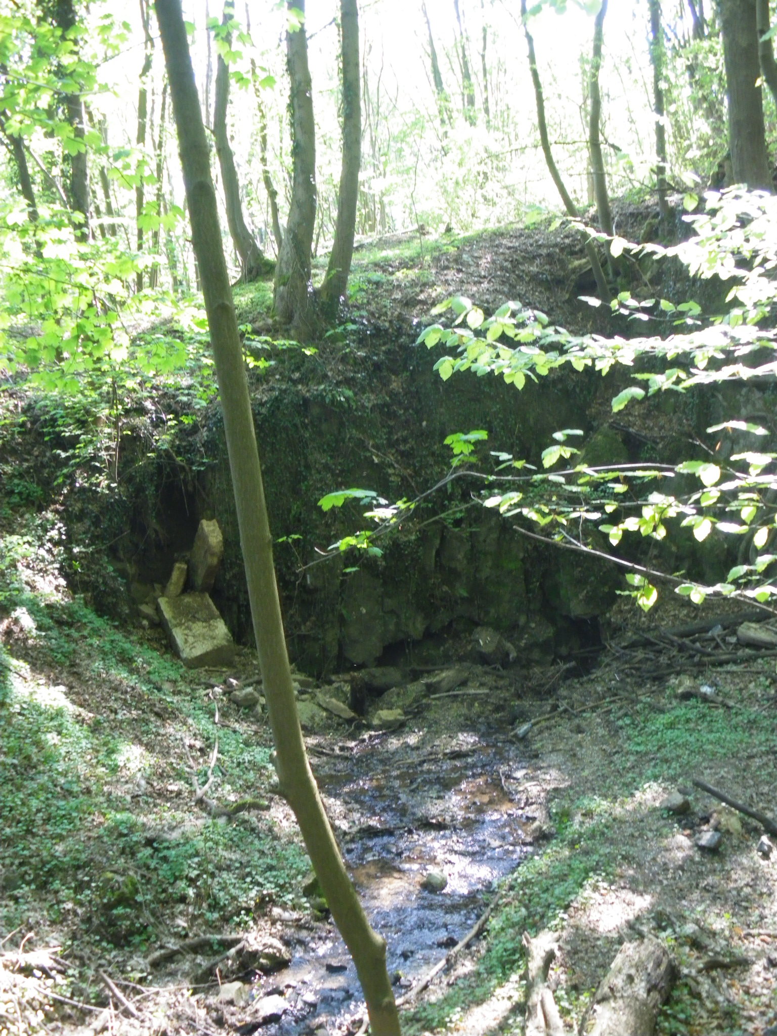 Roche-aux-faucons, le vendredi 24/04/2009